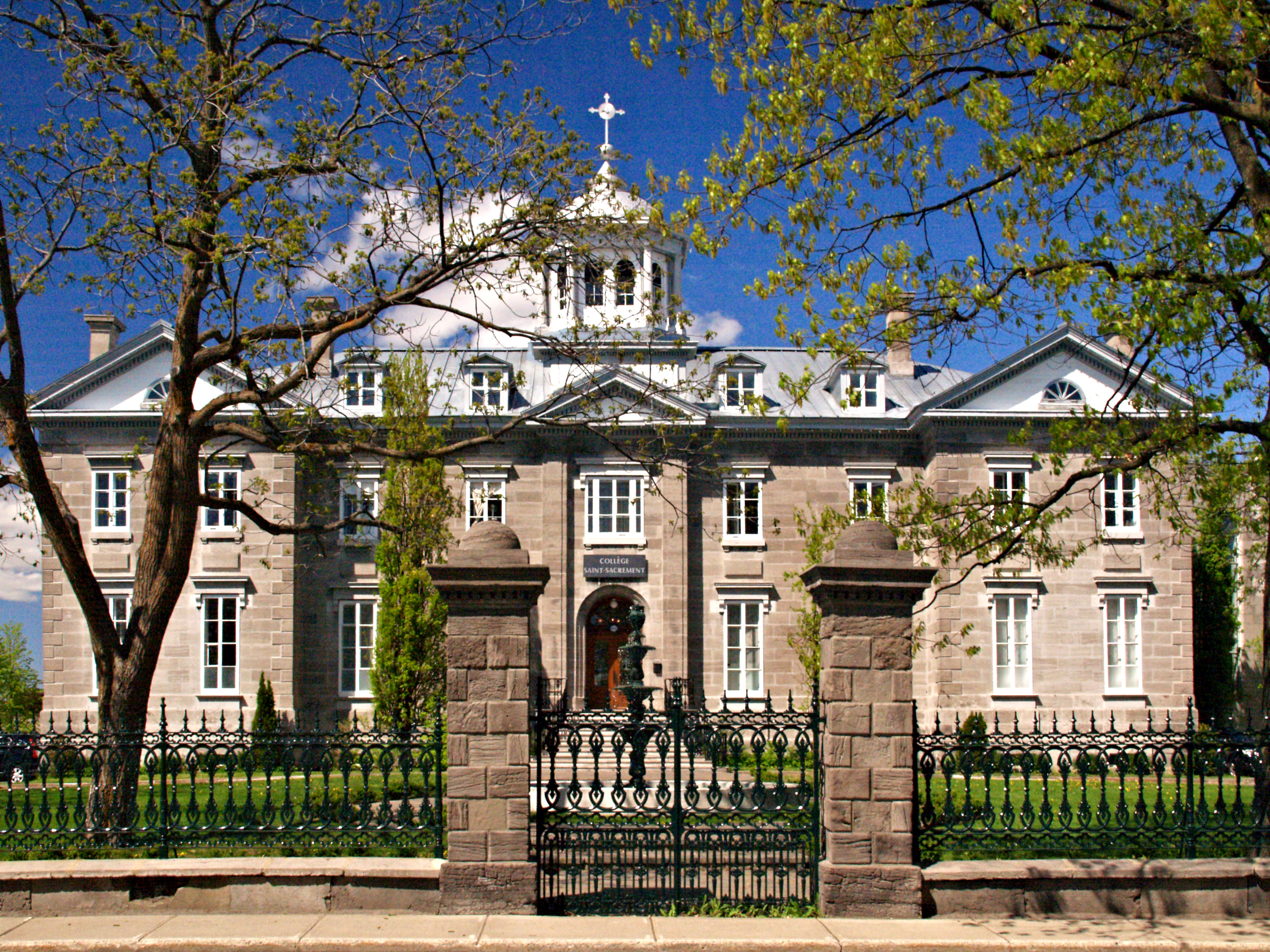 Terrebonne (Québec) - Collège Saint-Sacrement